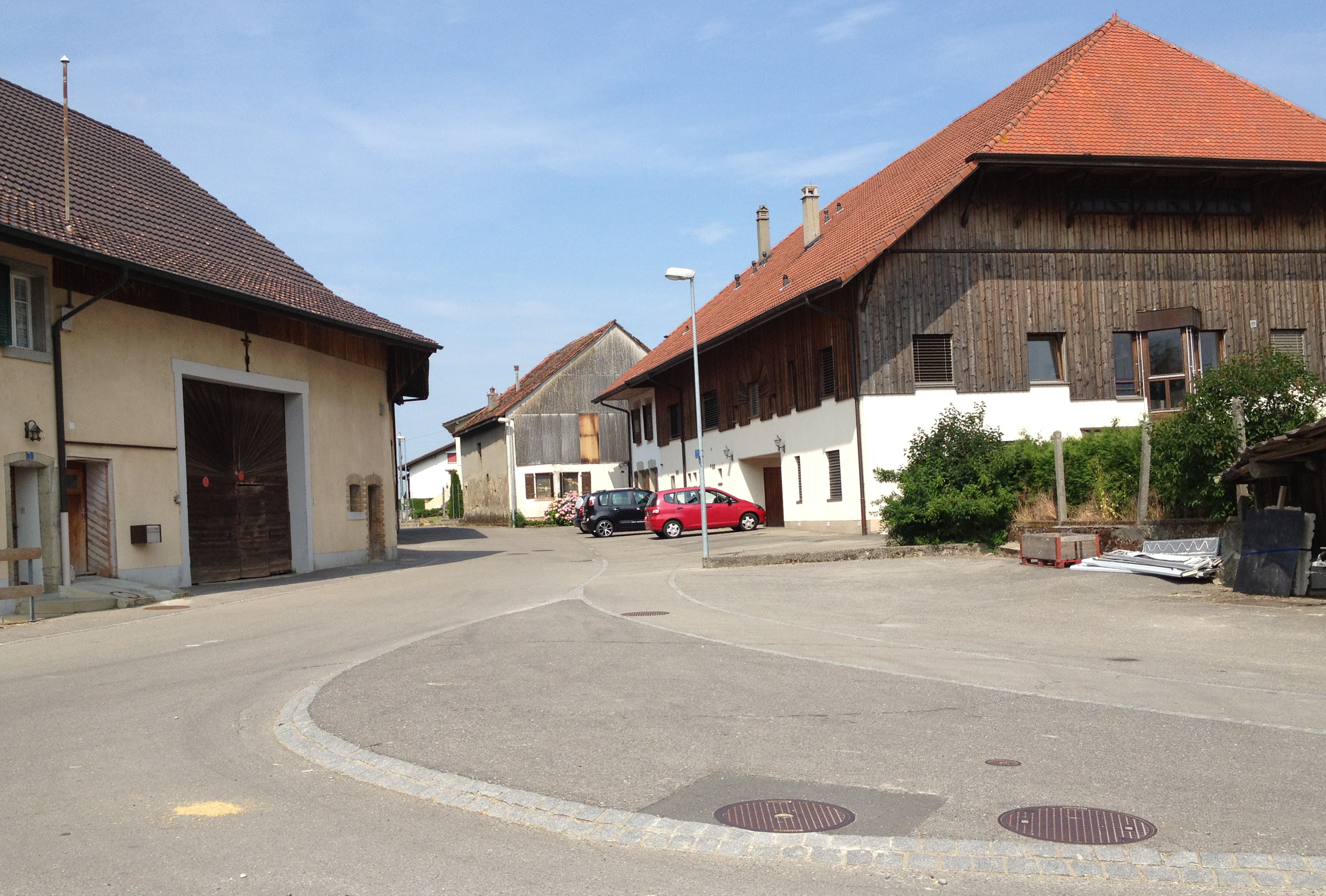 Le village de Montbrelloz dans la commune fribourgeoise de Vernay en Suisse.